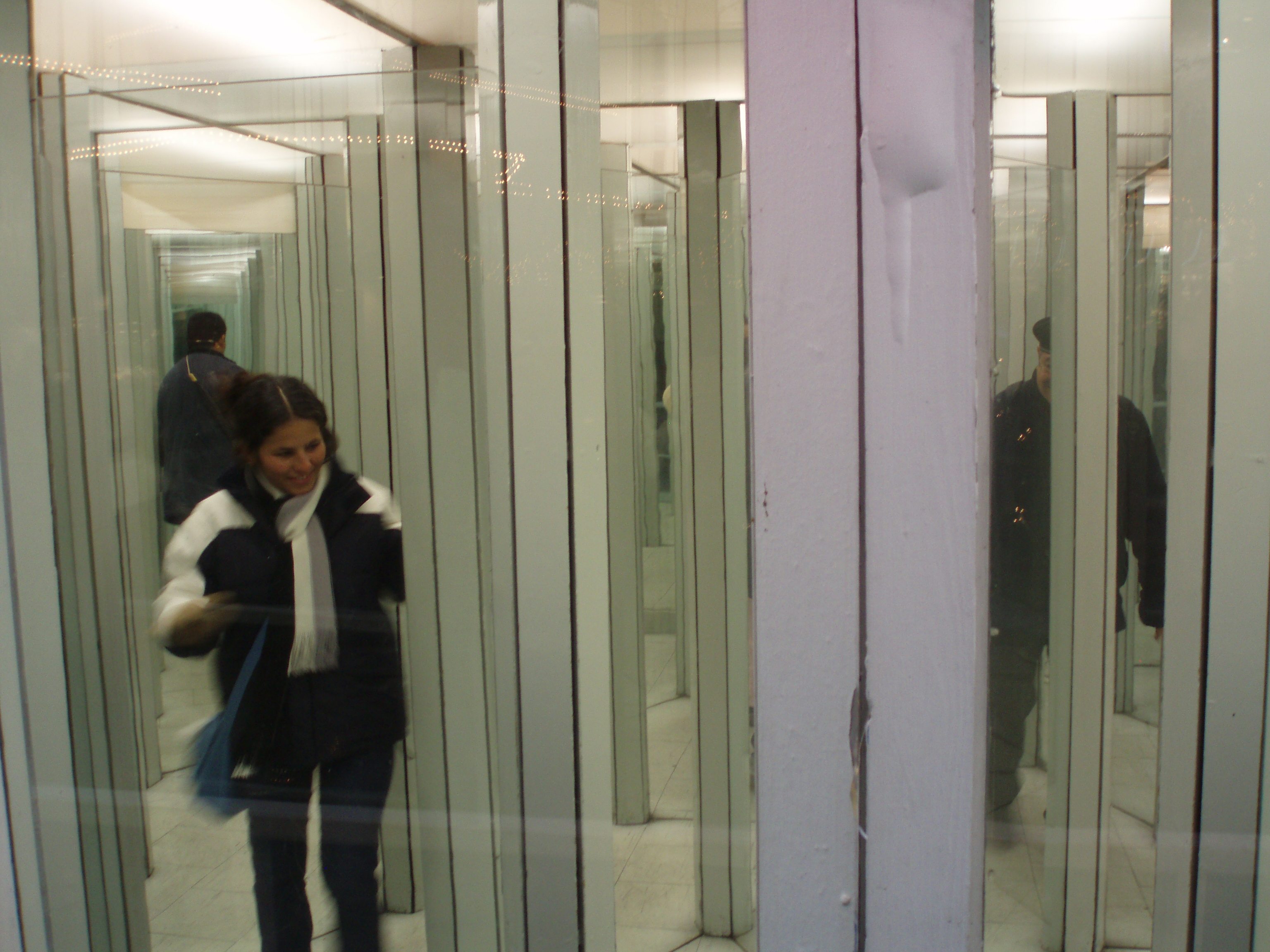 Spegelhallen i november 2006.